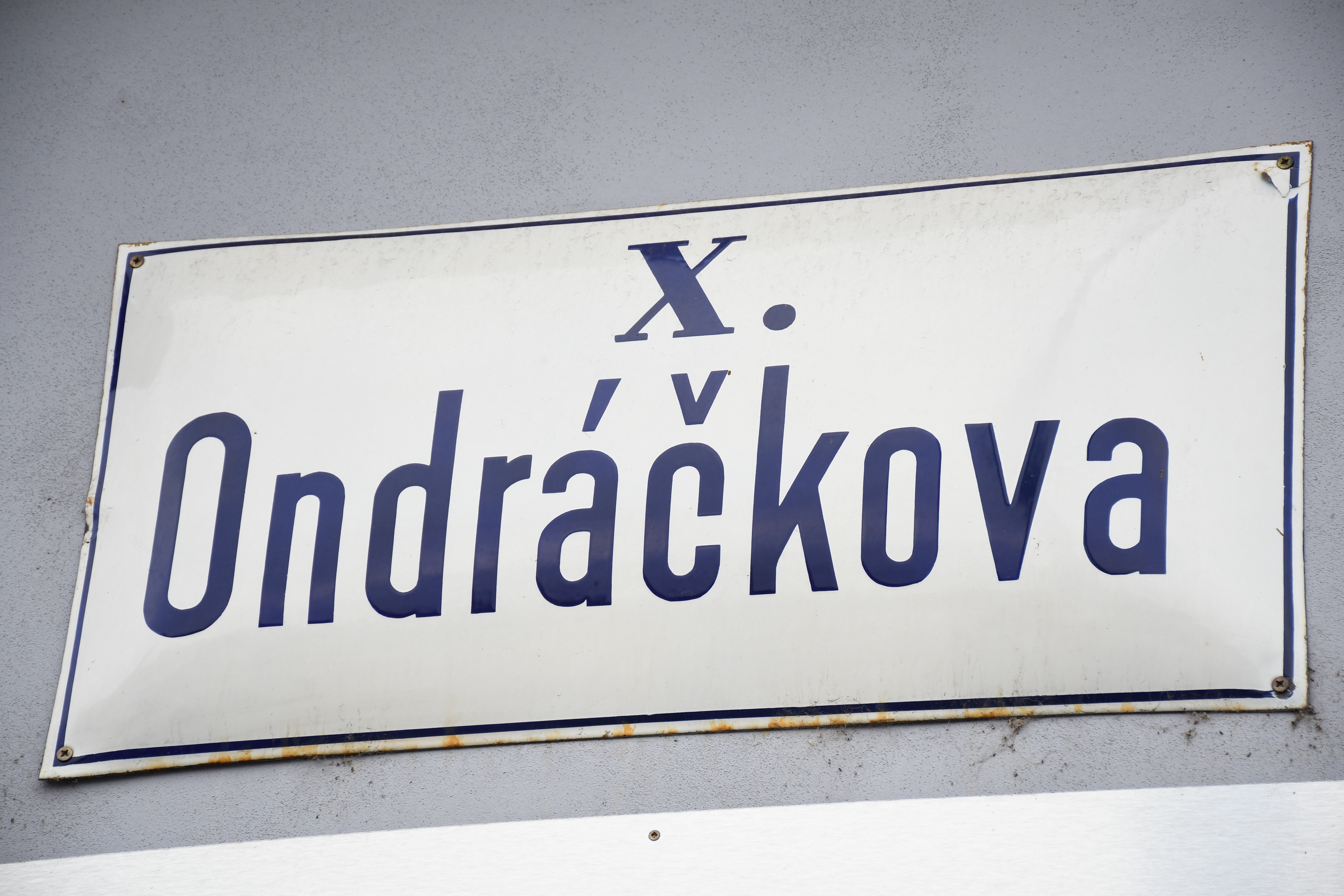 Brno X. jako pozůstatek starého administrativního dělení Brna na uliční ceduli na domě Šimáčkova 713/2, na začátku Ondráčkovy ulice u křižovatky se Šimáčkovou. Brno-Líšeň